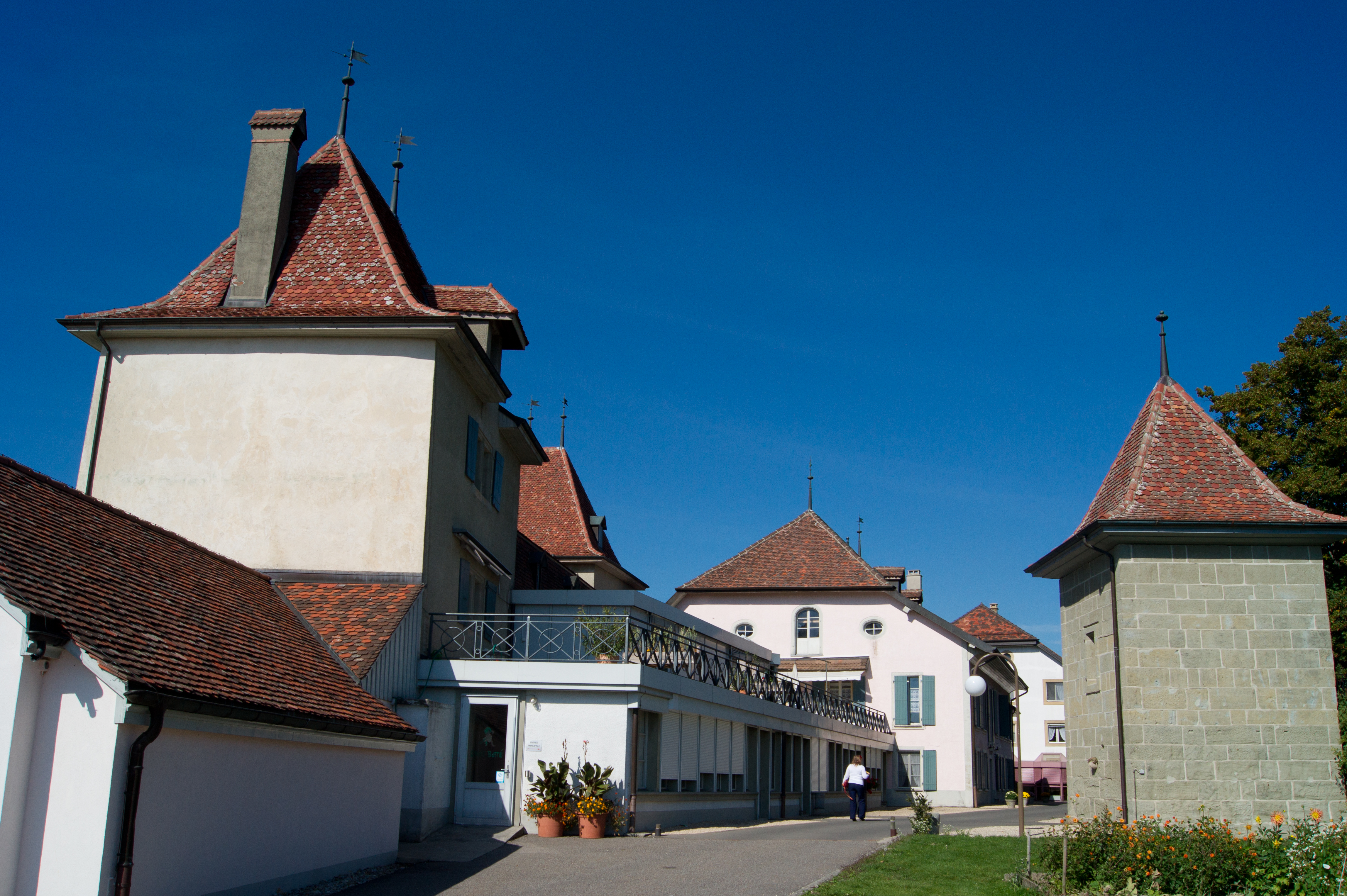 Château de Goumoens-la-Ville, canton de Vaud, Suisse.